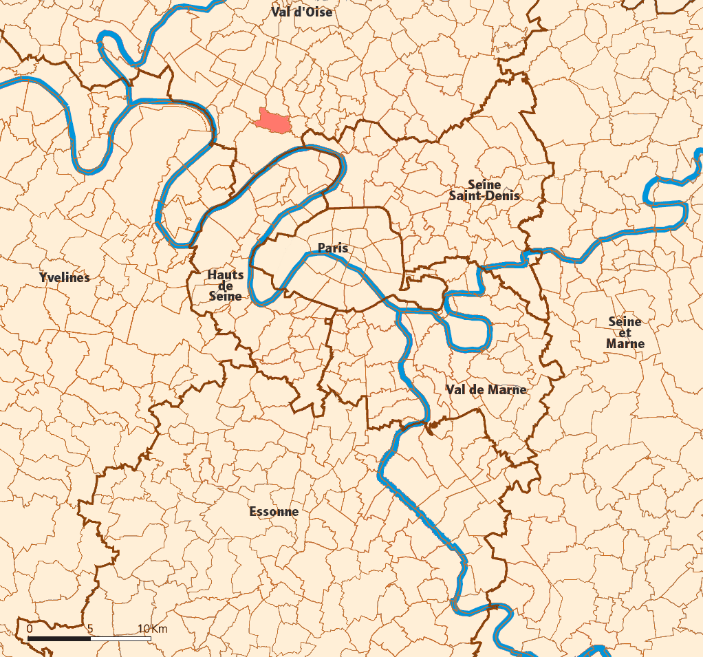 Sannois